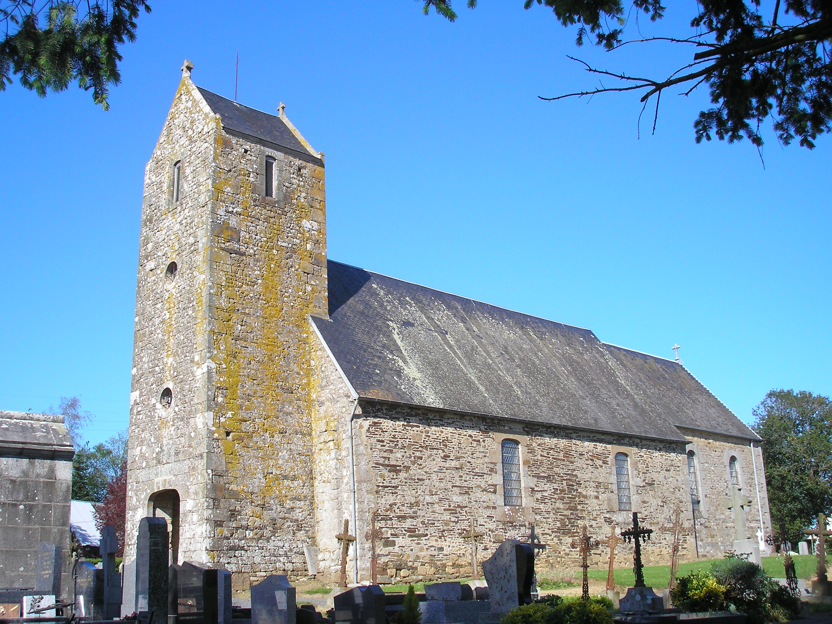 Chavoy (Normandie, France). L'église Notre-Dame.